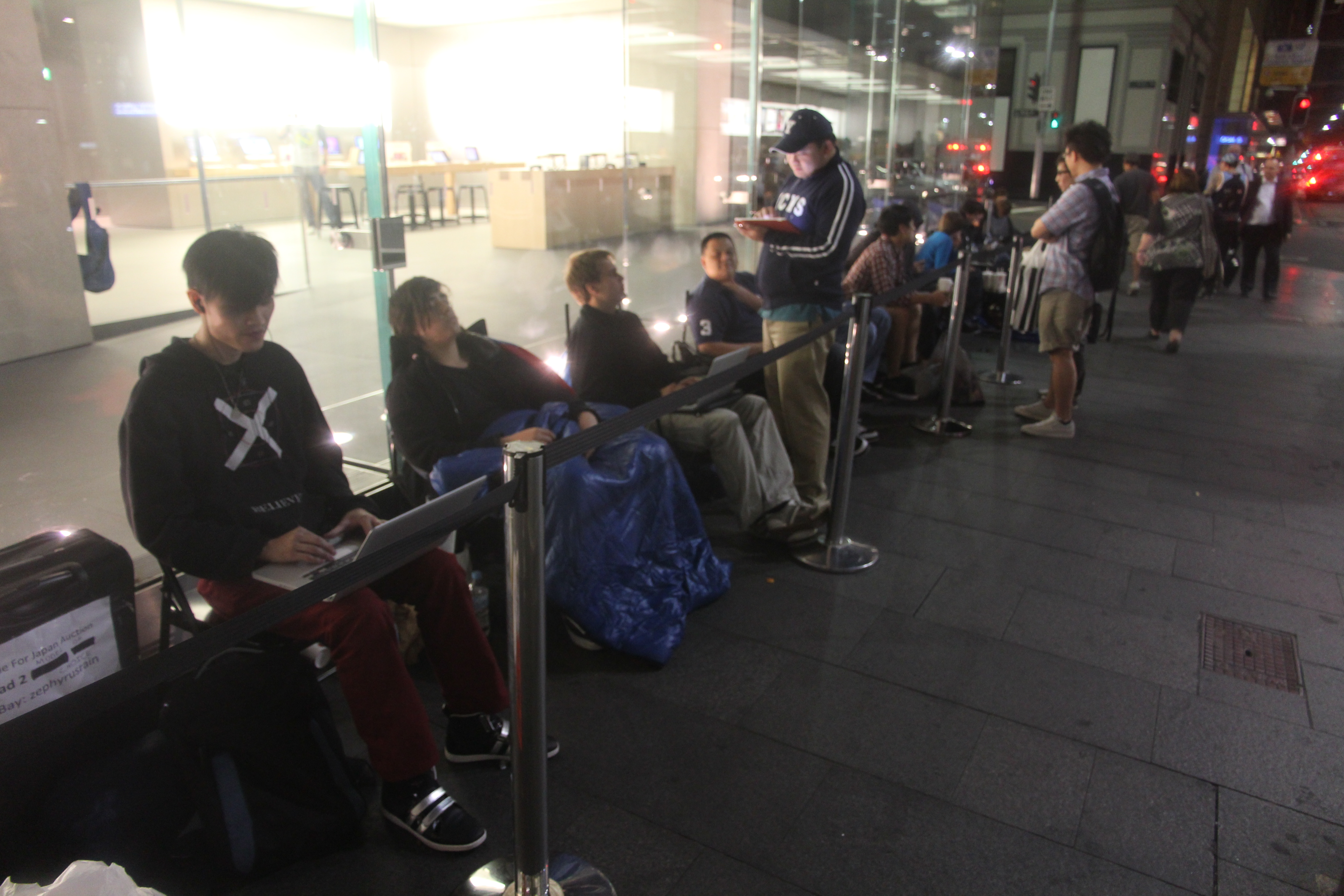 Line at 10:30pm